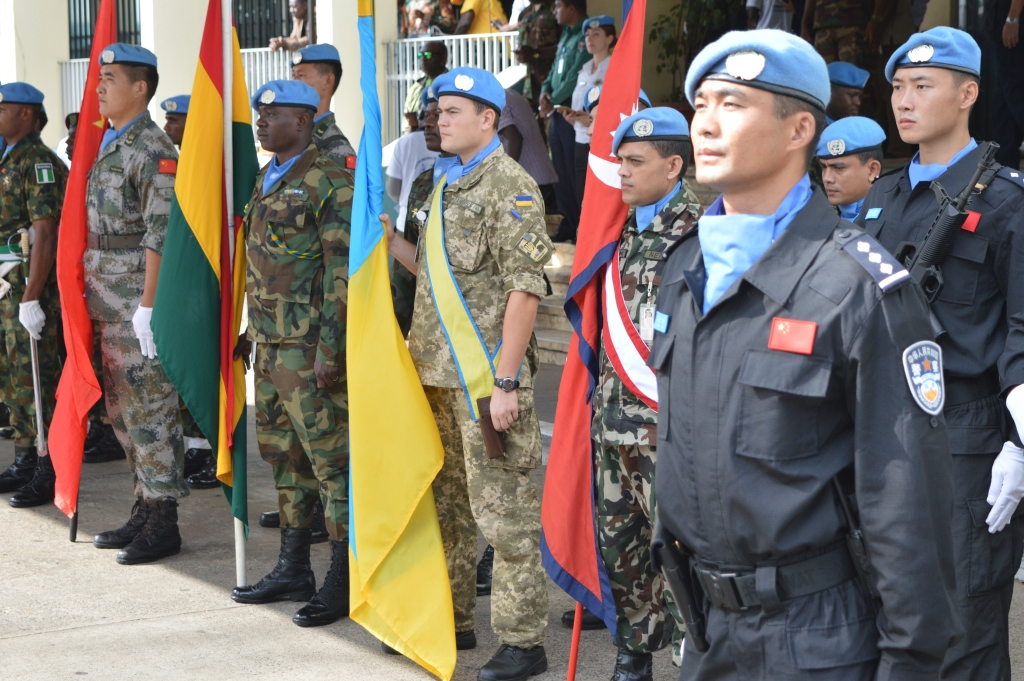 UNMIL: National contingent takes part in ceremony of celebration of International Day of United Nations Peacekeepers Sunday, May 29. LIBERIA — The Ukrainian military of the 56th Detached Helicopter Unit (DHU) of the UNMIL joined the ceremonies on the occasion of the International Day of United Nations Peacekeepers. Special Representative of the Secretary General Farid Zarif and Liberia’s Defence Minister Brownie J. Samukai laid wreaths in honour of peacekeepers having lost their lives in Liberia at a ceremony to mark the International Day of United Nations Peacekeepers at the Monrovia headquarters of the United Nations Mission in Liberia. “The sacrifice, peacekeepers have made, should not and will not go in vain. Thanks to them, we have the future in our country,” Minister Samukai said. Українські військові зі складу 56 окремого вертолітного загону Місії ООН у Ліберії долучилися до урочистостей з нагоди Міжнародного дня миротворців ООН, котрі відбулися у штабі Місії в Монровії. В цей день вітають не лише тих хто виконує або виконував миротворчі завдання під блакитним прапором ООН, але й вшановують усіх, хто віддав своє життя у боротьбі за справу миру. У пам’ять про них Спеціальний представник генерального секретаря ООН у Ліберії Фарід Заріф та Міністр оборони Республіки Бровні Самукай поклали вінки. Містер Бровні Самукай також розповів, що завдяки миротворцям ООН у країни з’явилася надія на краще майбутнє. Все чого Ліберія досягла — так чи інакше пов’язано з діяльністю блакитних шоломів. За словами урядовця, вагомий внесок, котрий Організація Об’єднаних Націй зробила у розвиток ліберійської нації ніколи не буде забутий. На церемонії Україну представляла прапороносна група військовослужбовців 56 окремого вертолітного загону. Завершились урочистості підняттям прапору ООН та національного стягу Республіки Ліберія. Фото: Павло Ковальчук